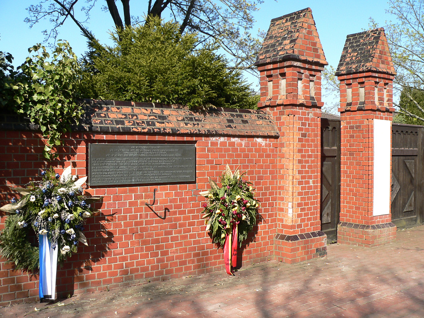 Gartenbauanstalt Tor